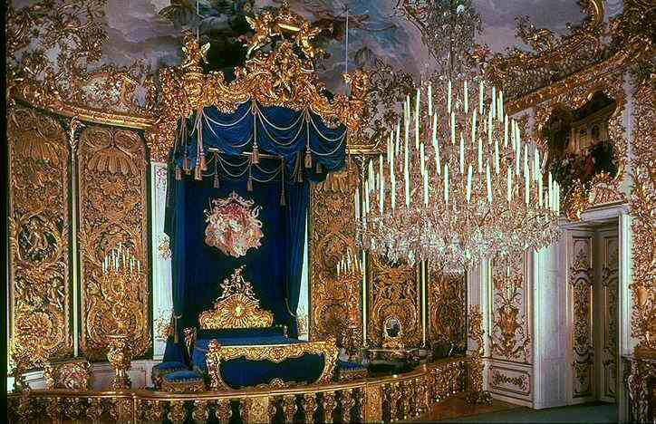 Phot personnelle